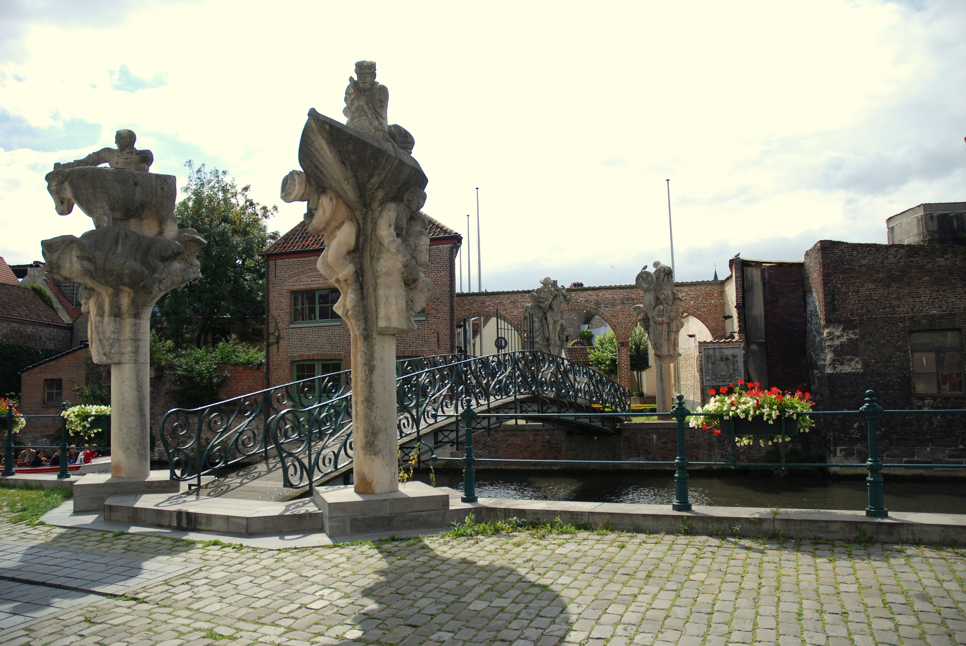 Het Leeuwenhof te Gent met de brug der Geneugten of de Keizer Karelbrug